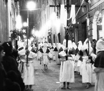 comune di cagli foto